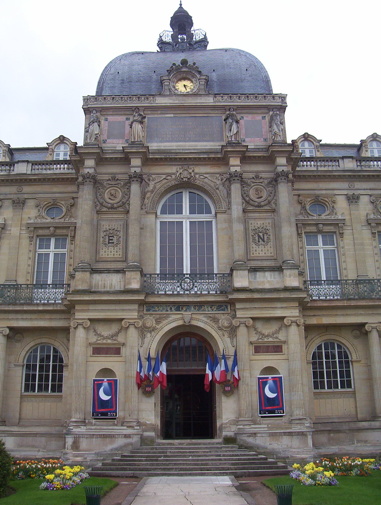 Amiens - Musée de Picardie.